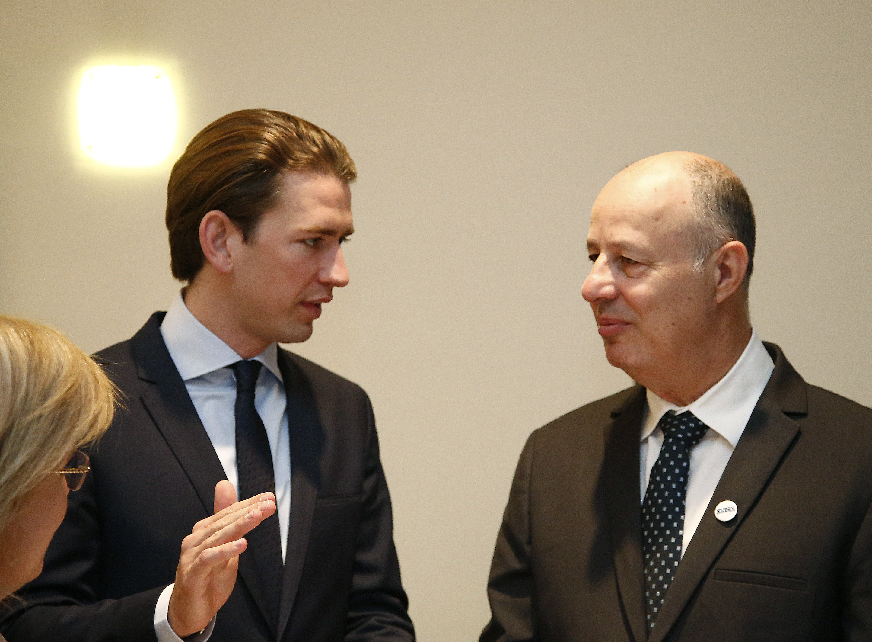 OSCE Mediterranean Conference 2016. Bundesminister Sebatian Kurz im Gespräch mit dem israelischen Kanzleramtsminister Tzachi Hanegbi. Wien, Hofburg, Foto: Dragan Tatic